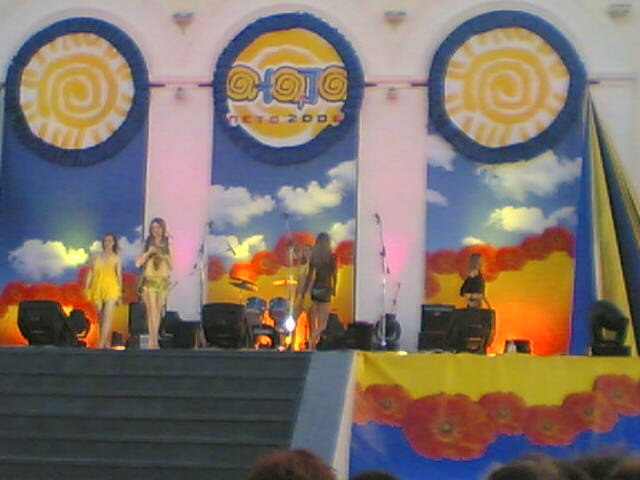 На карнавале в Анапе